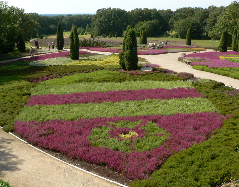 Heidegarten Schnevedingen